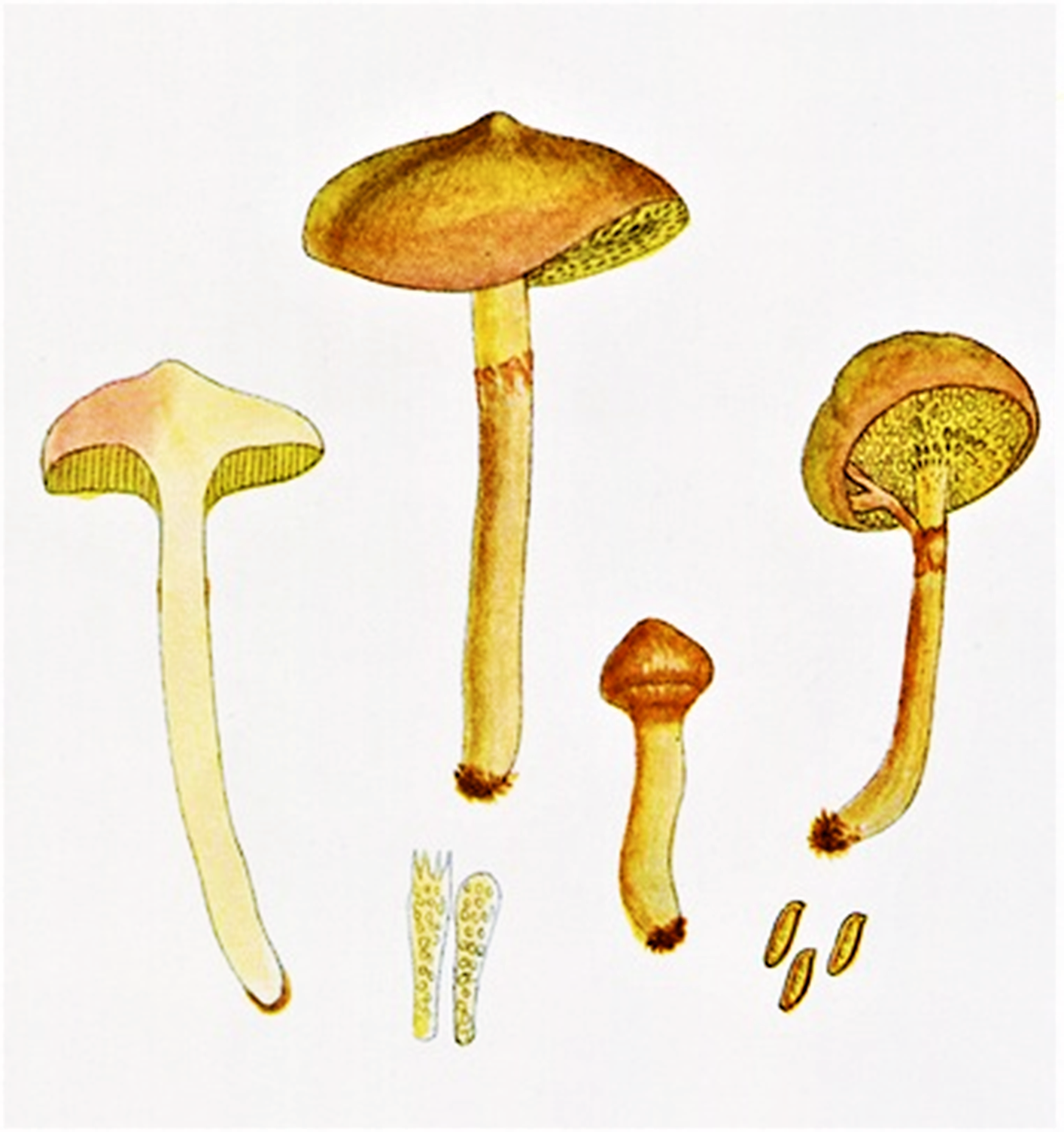 Giacomo Bresadola: Boletus flavidus Fr., 1815, heute Suillus flavidus (Fr.) J.Presl